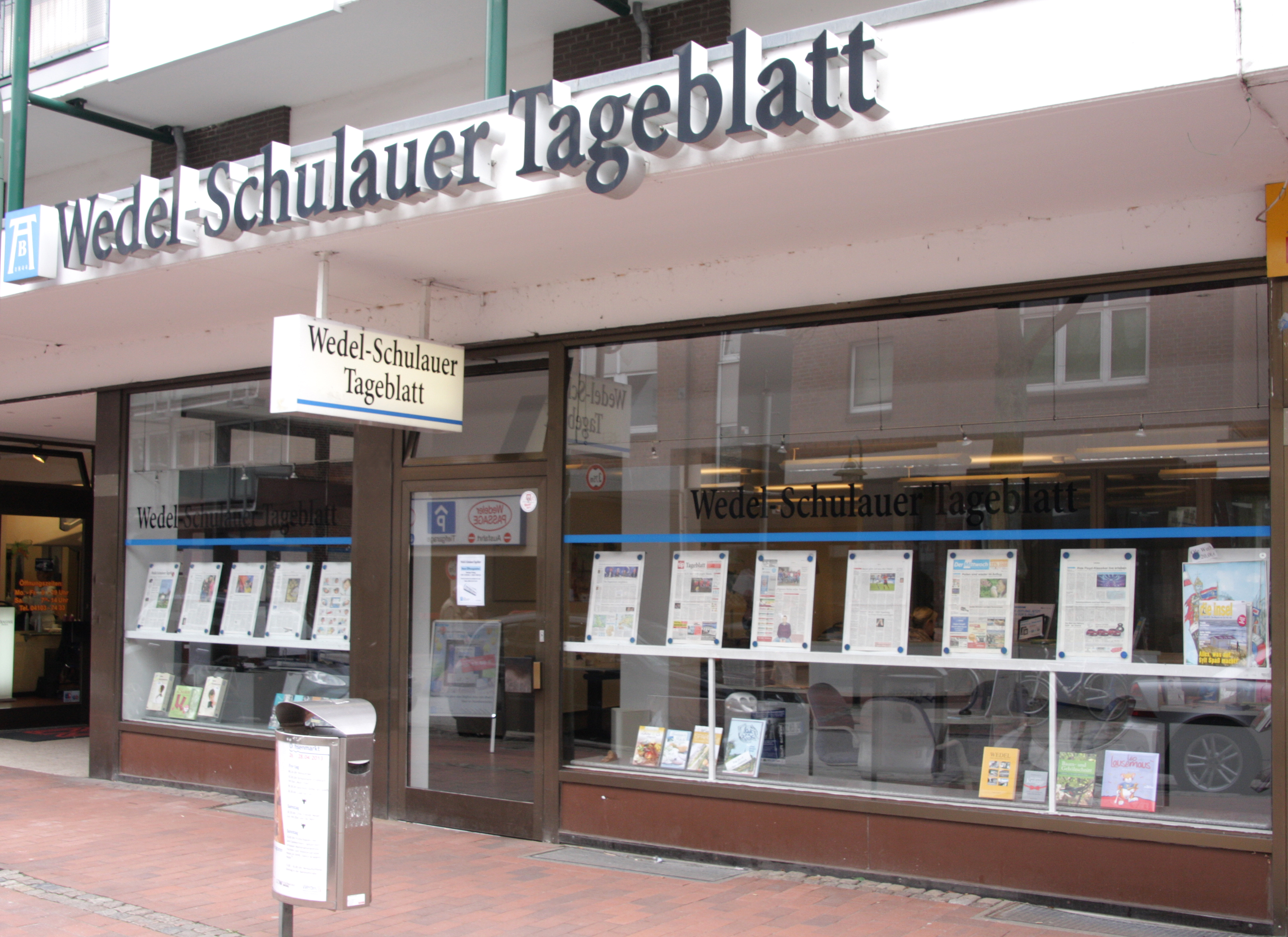 Geschäftsstelle des Wedel-Schulauer Tageblatt